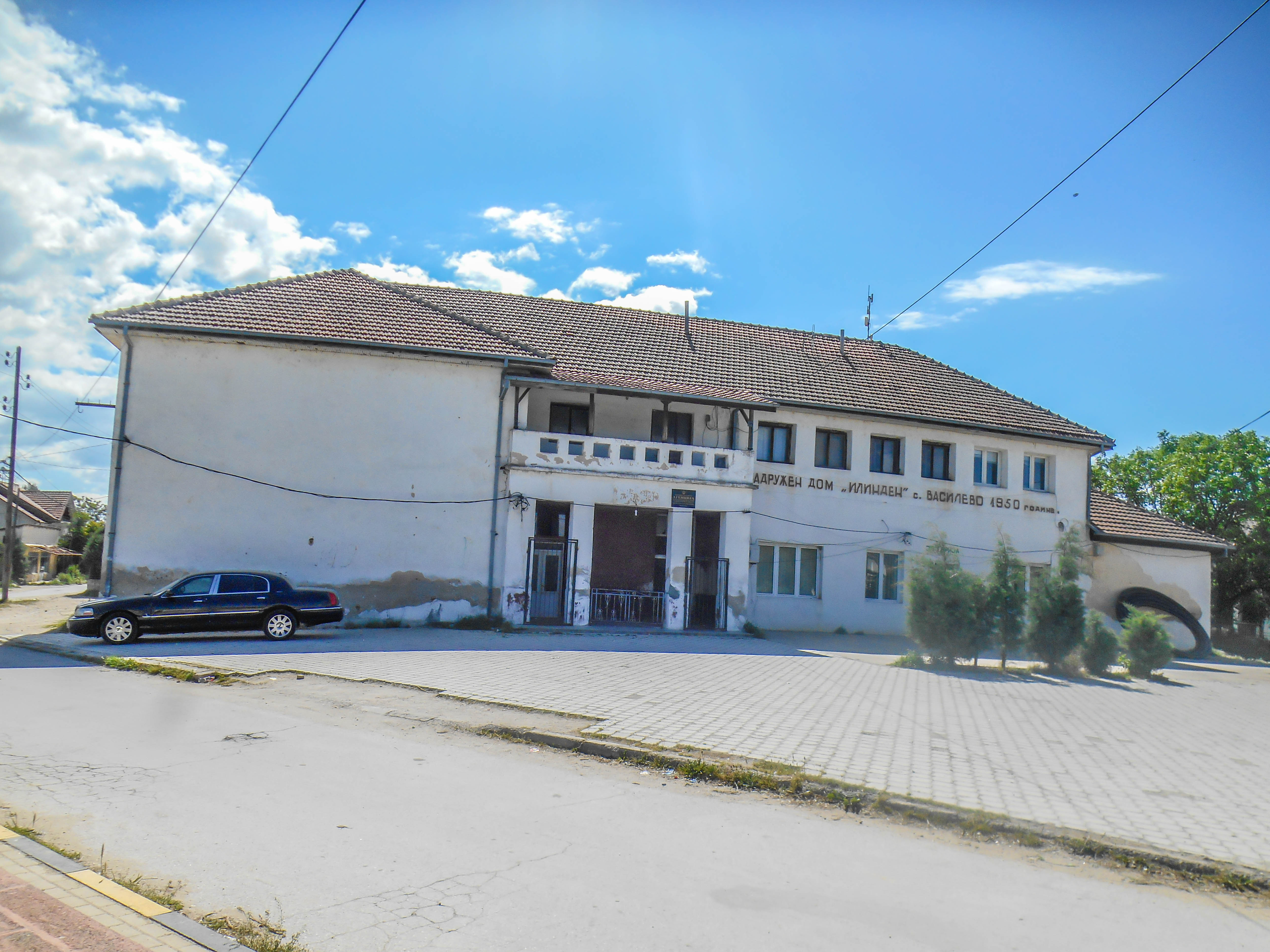 Дом на култура - Василево